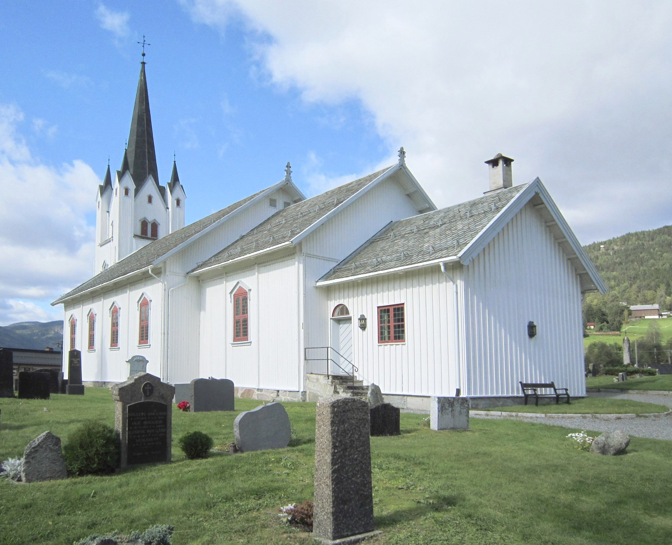 Eggedal kirke